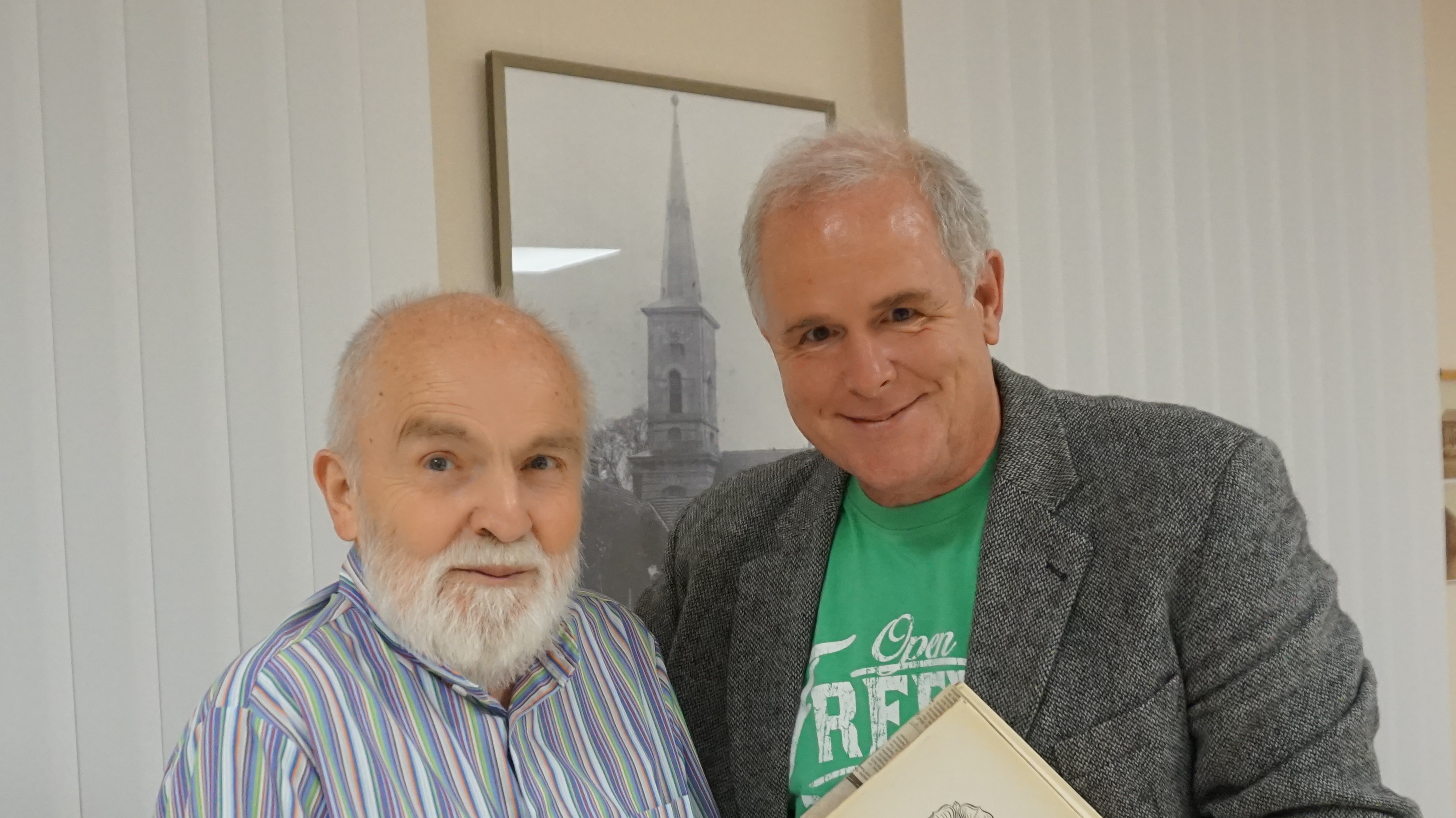 Prof. Dr. Carl-Jürgen Kaltenborn bei einem Refarat zum Thema Reformation im Dorfgemeinschaftshaus Birkholz mit Ulrich Buhrow dem Vorsitzenden des Förderverein Dorfkirche Birkholz